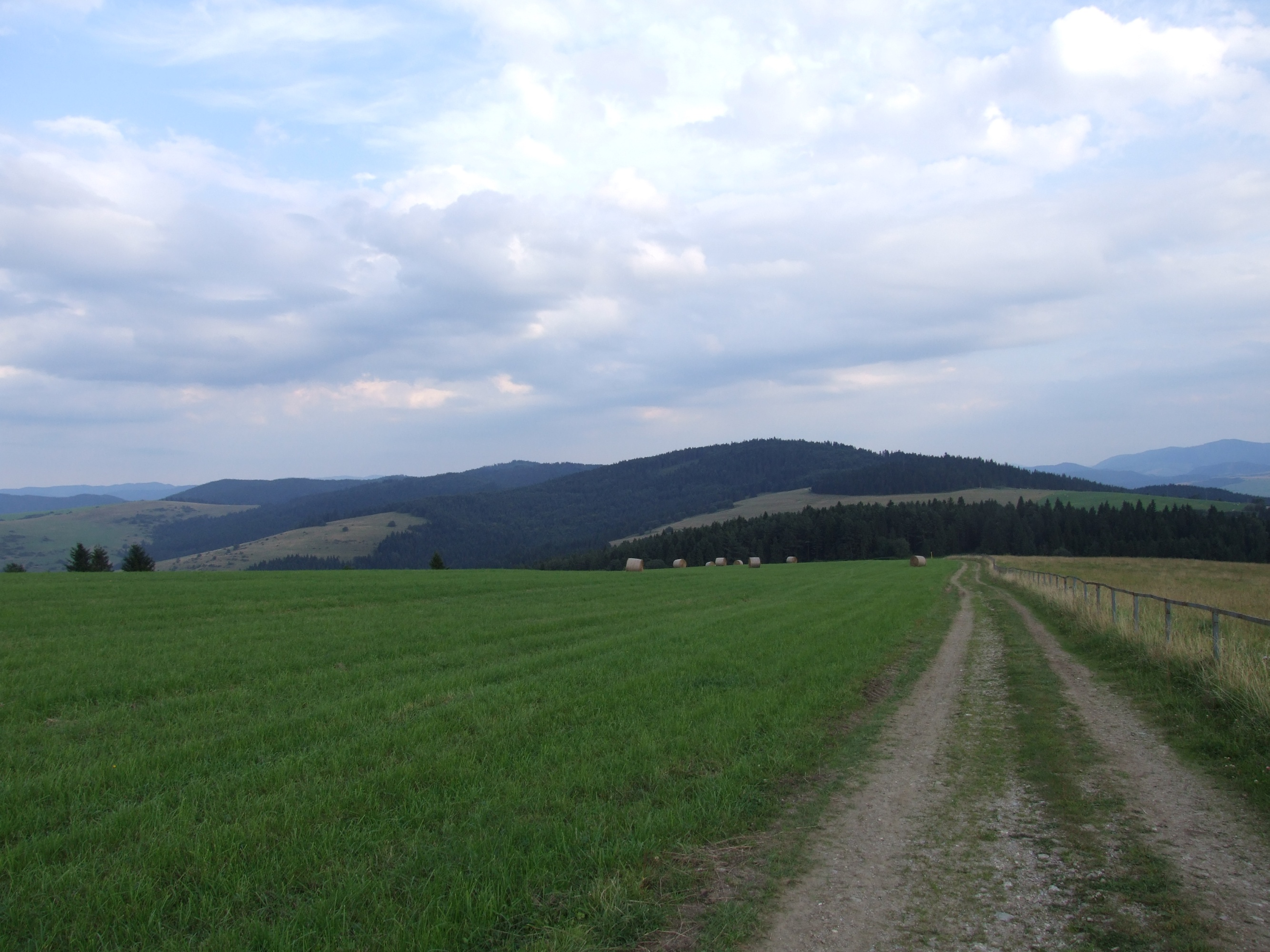 Widok z okolic przełęczy Vabec. W głębi Medvedelica